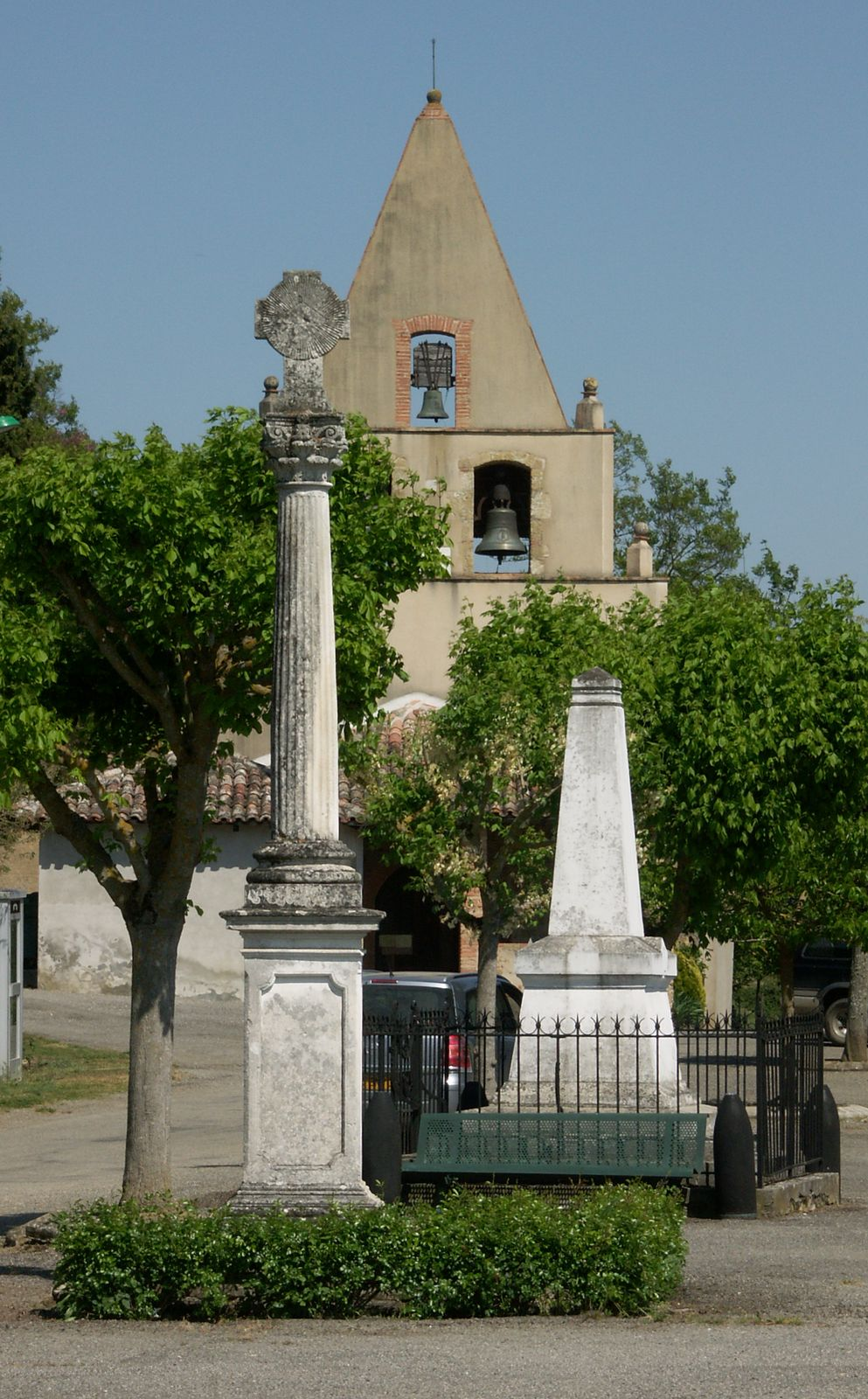 Stèle maçonnique(Référence nécessaire) d'Agassac